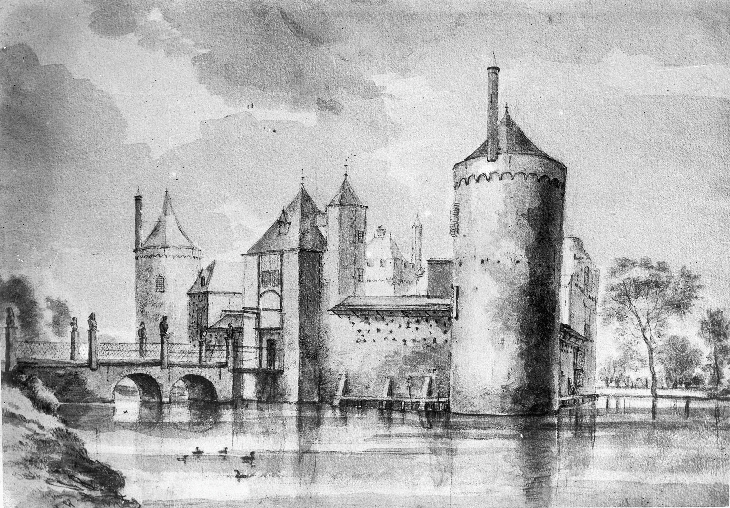 Slot Schagen: naar 17e eeuwse tekening